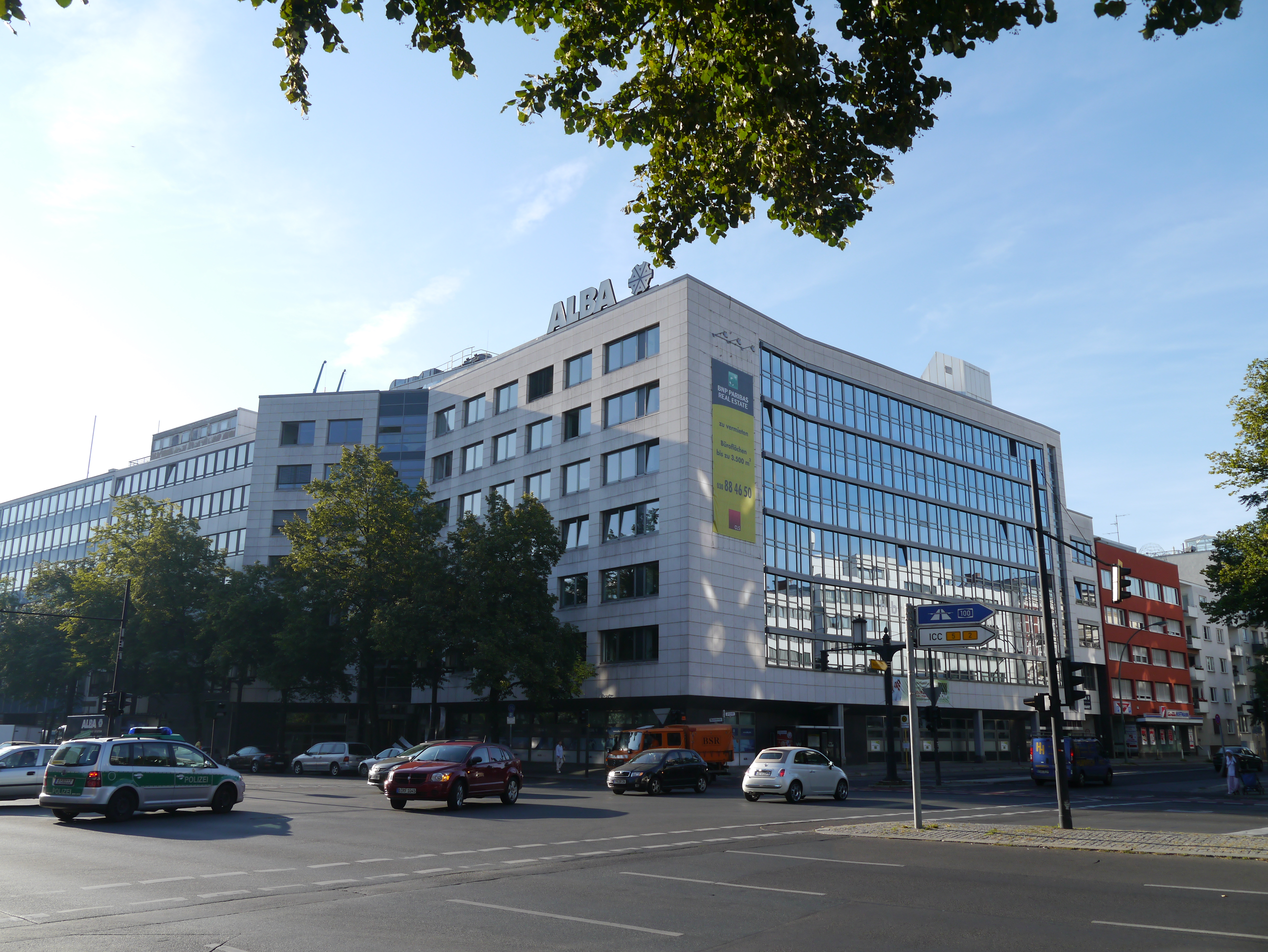 ALBA Group Zentrale, Bismarckstraße